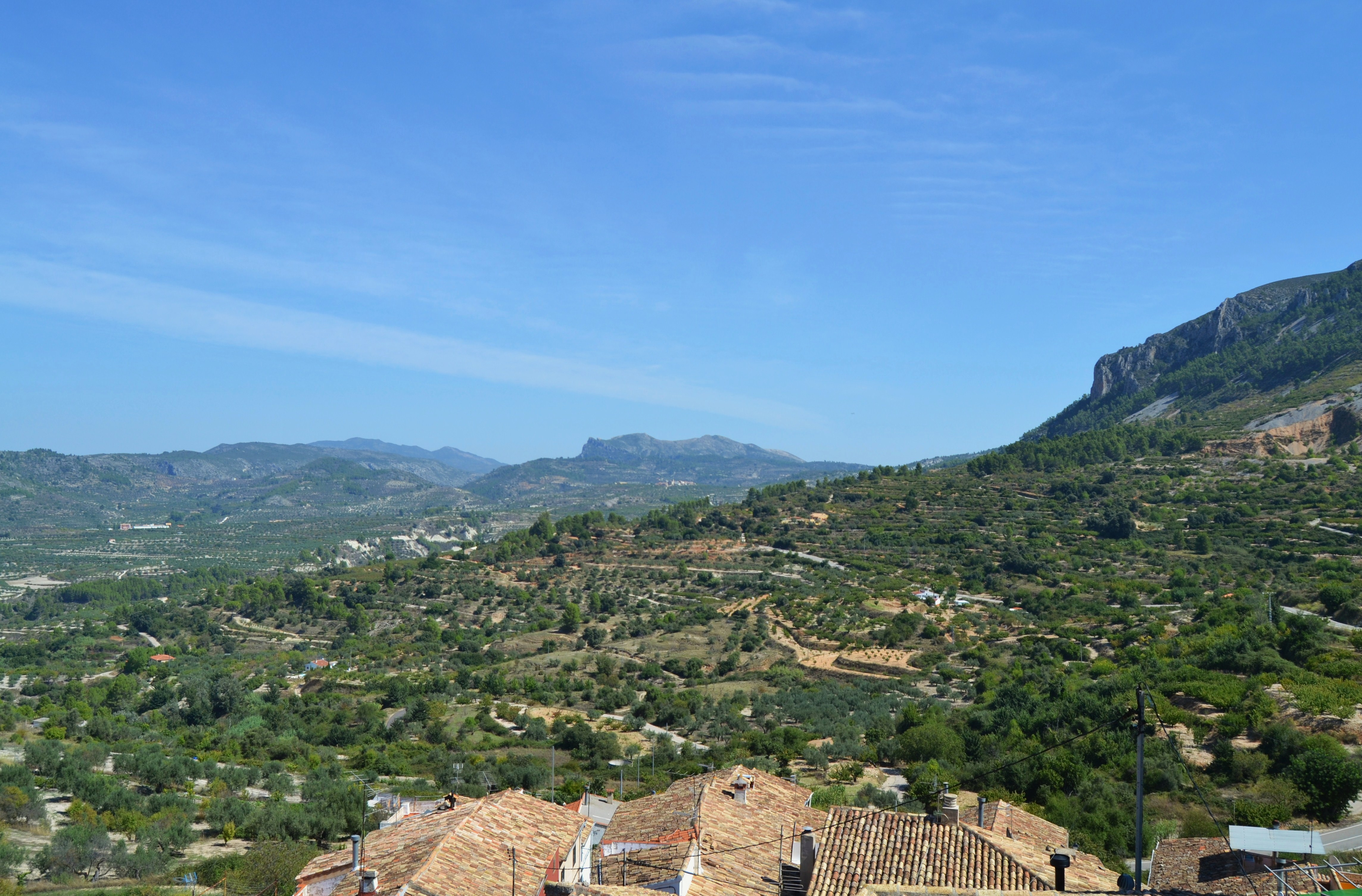 Vista cap al nord-est des de la torre d'Almudiana.